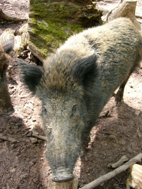 Bilder der Wildschweingehege von Schloss Tambach